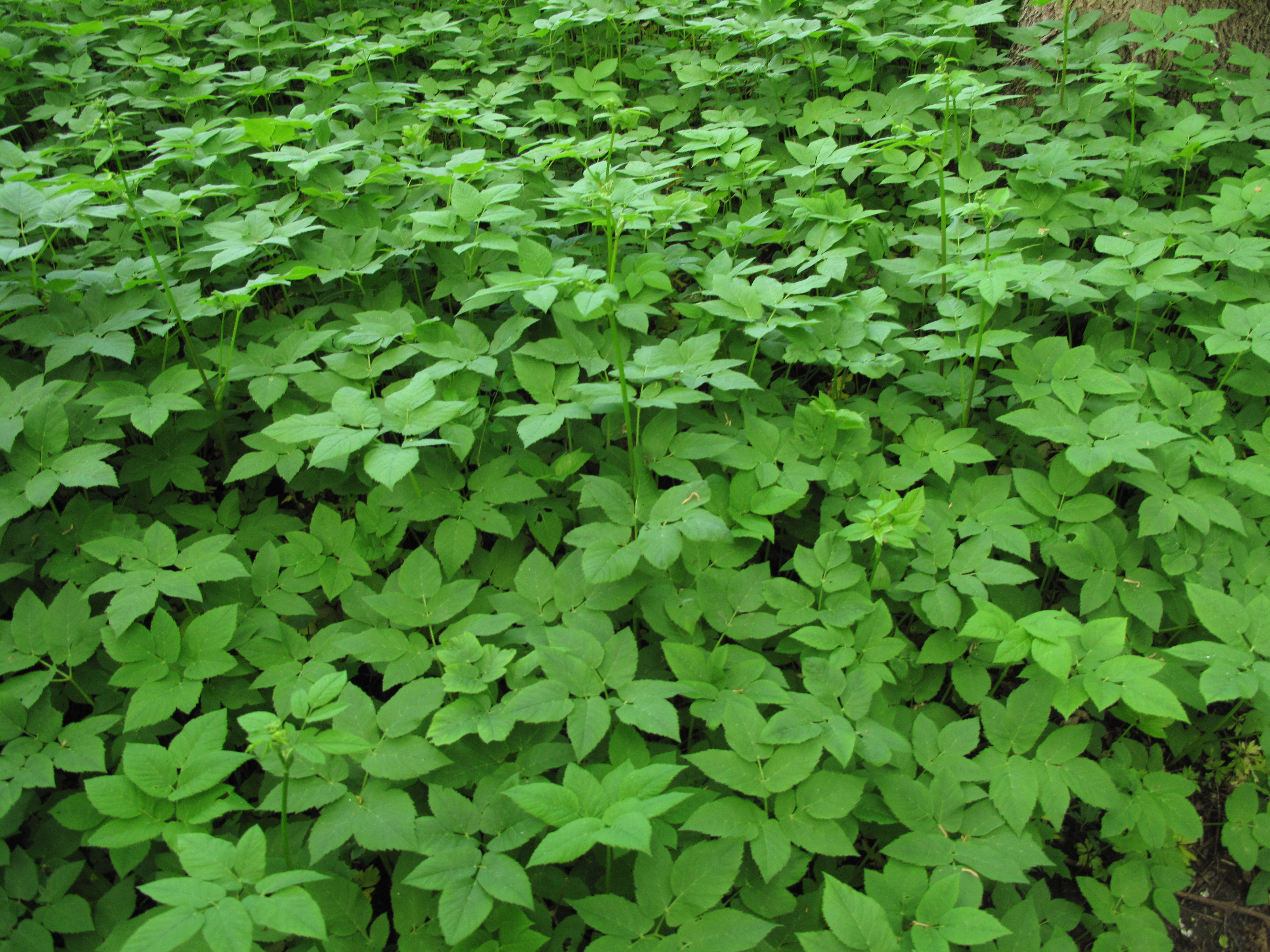 Přírodní rezervace Loužek. Okres Litoměřice, Česká republika.